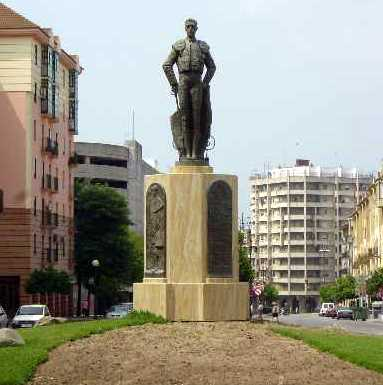 Huelva. Estatua dinastía de los Litri